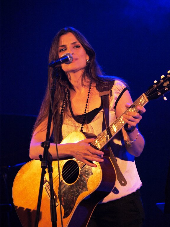 תמר גלעדי בהופעה במרכז עינב לתרבות, ת"א 2012